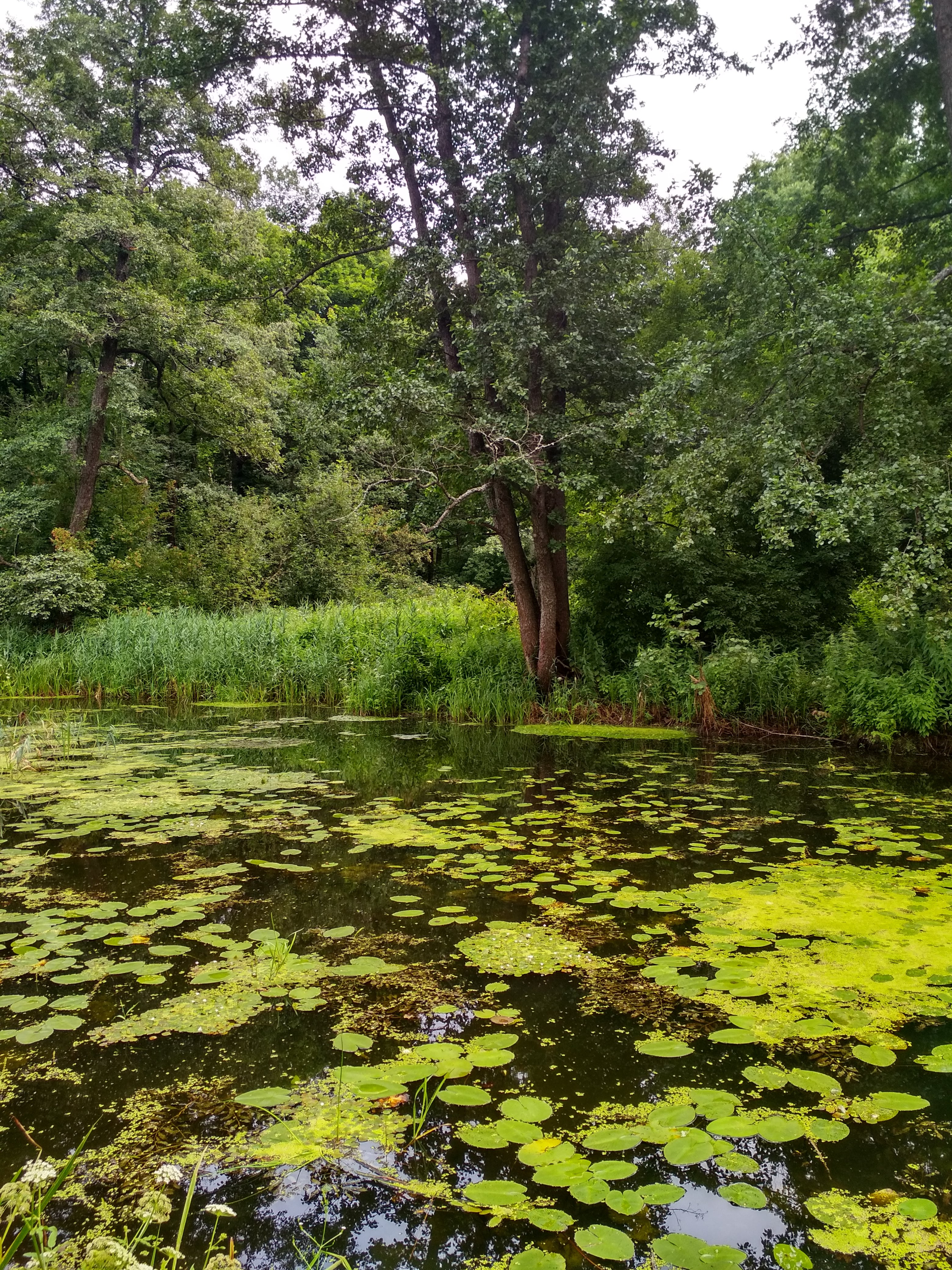 Воронежский заповедник: Территория заповедника расположена на границе Воронежской (Верхнехавский р-н) и Липецкой (Усманский р-н) областей и занимает северную половину островного лесного массива – Усманского бора., Верхнехавский район, Воронежская область This image is related to the protected area of Russia number 3600069